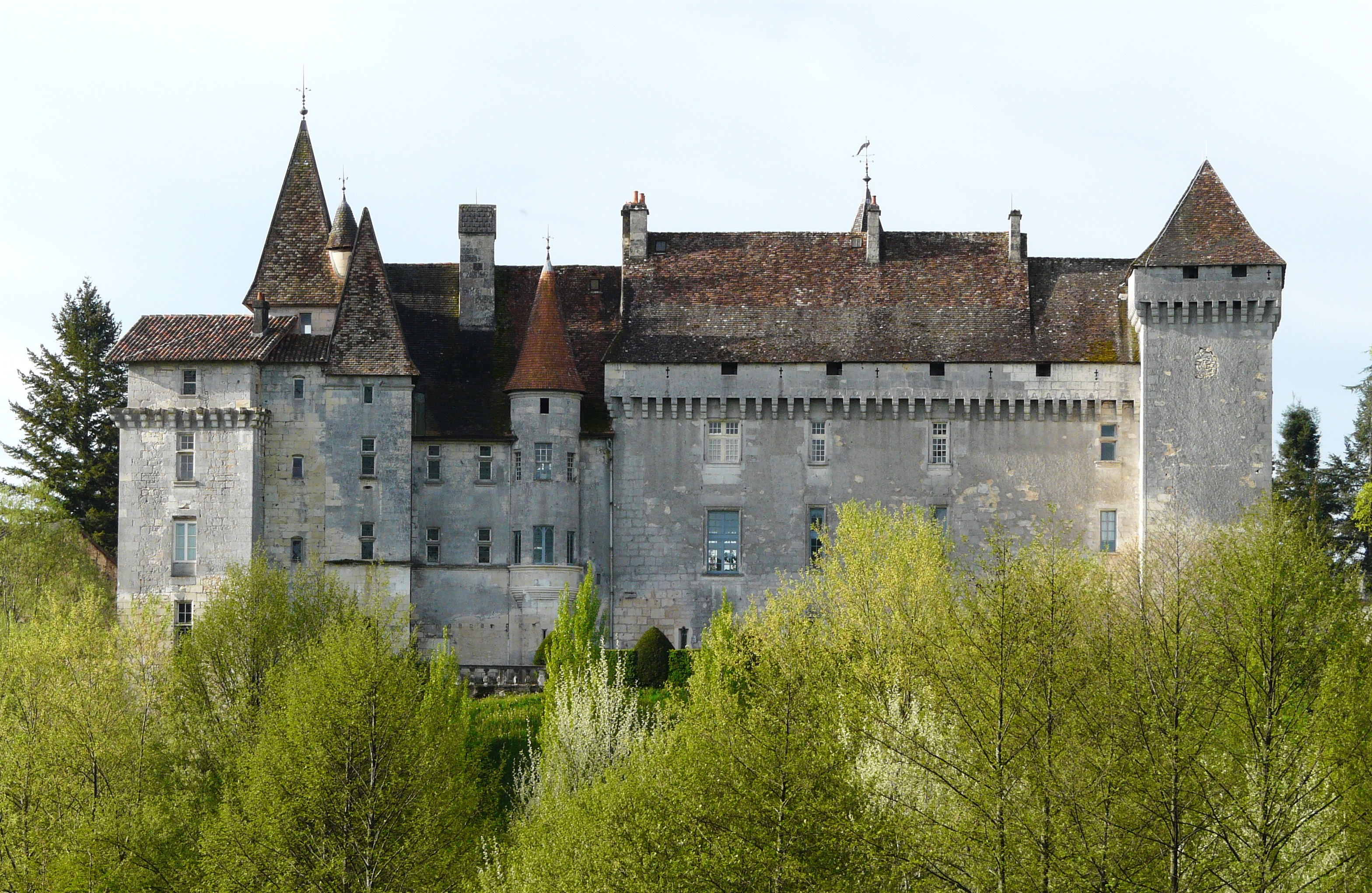 Le château de Château-l'Évêque vu du nord, Dordogne, France